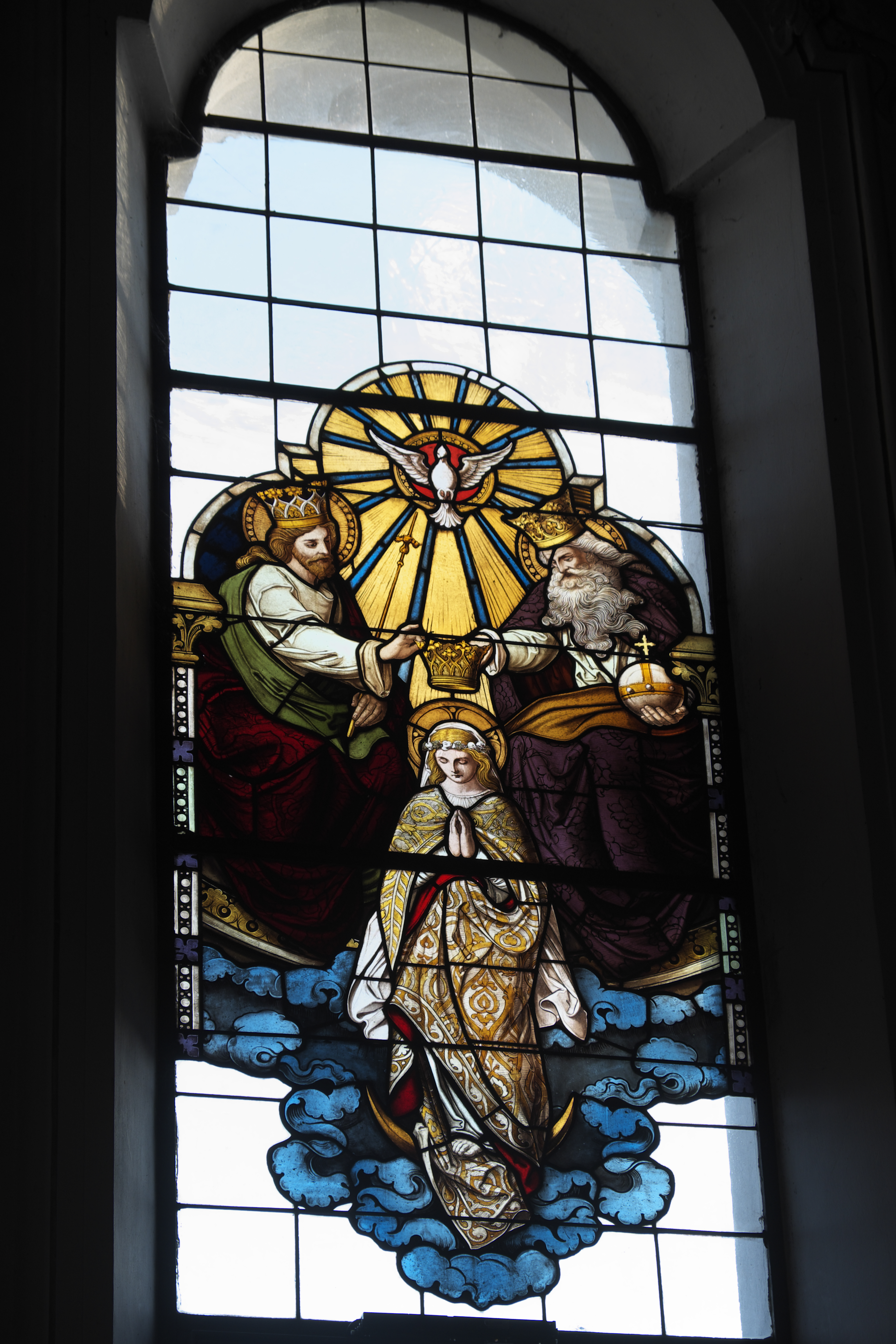 Katholische Pfarrkirche St. Vitus in Au in der Hallertau im Landkreis Freising (Bayern/Deutschland), Bleiglasfenster; Darstellung: Marienkrönung